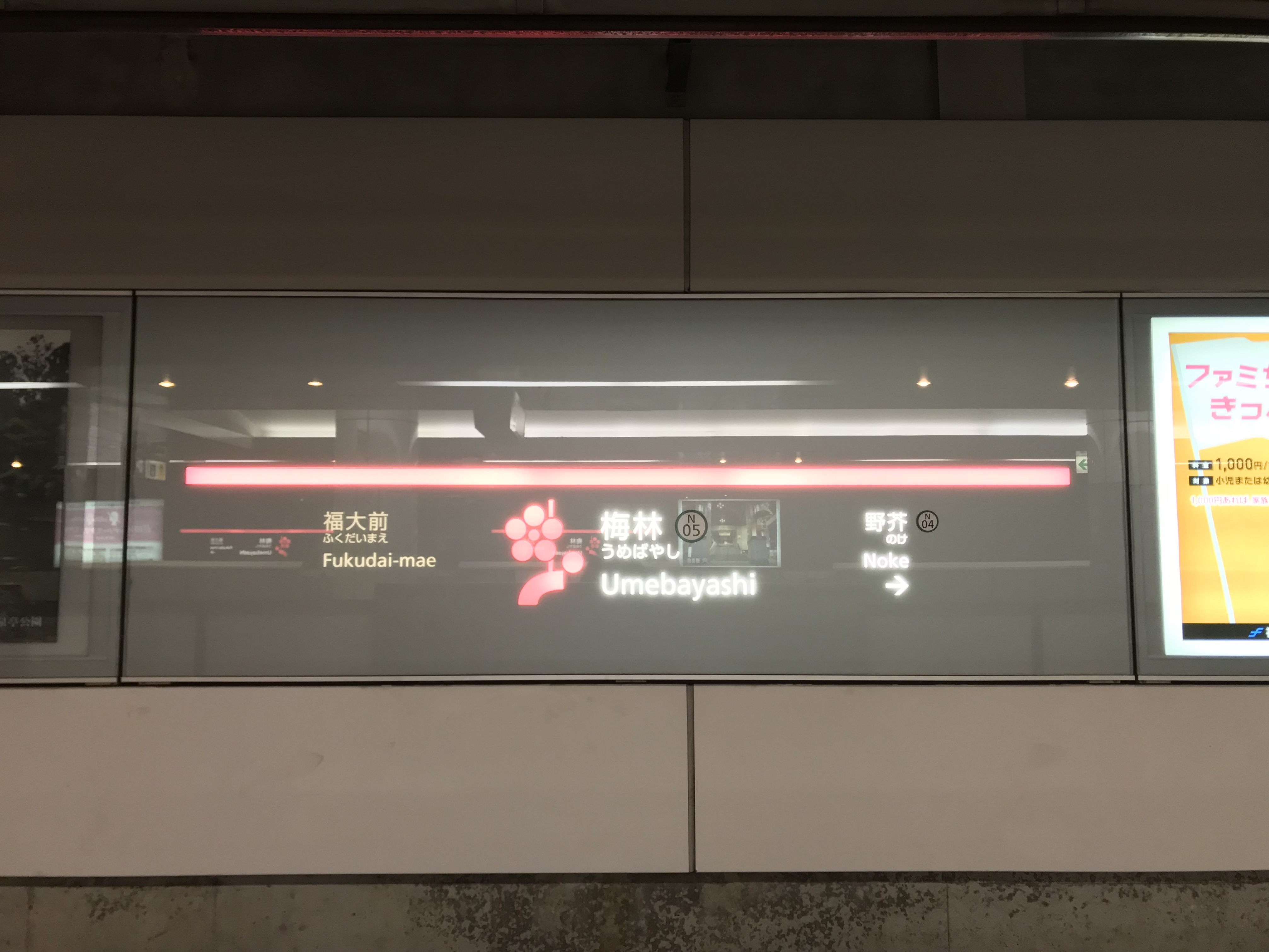 梅林駅の駅名標。イラストはウメの花